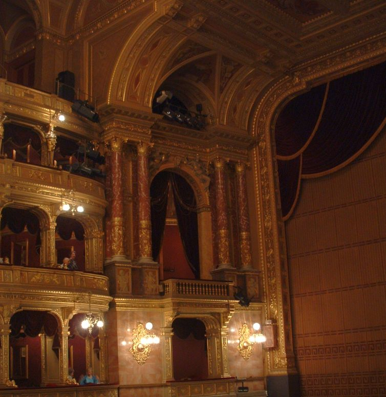 Oldalpáholyok a Magyar Állami Operaházban